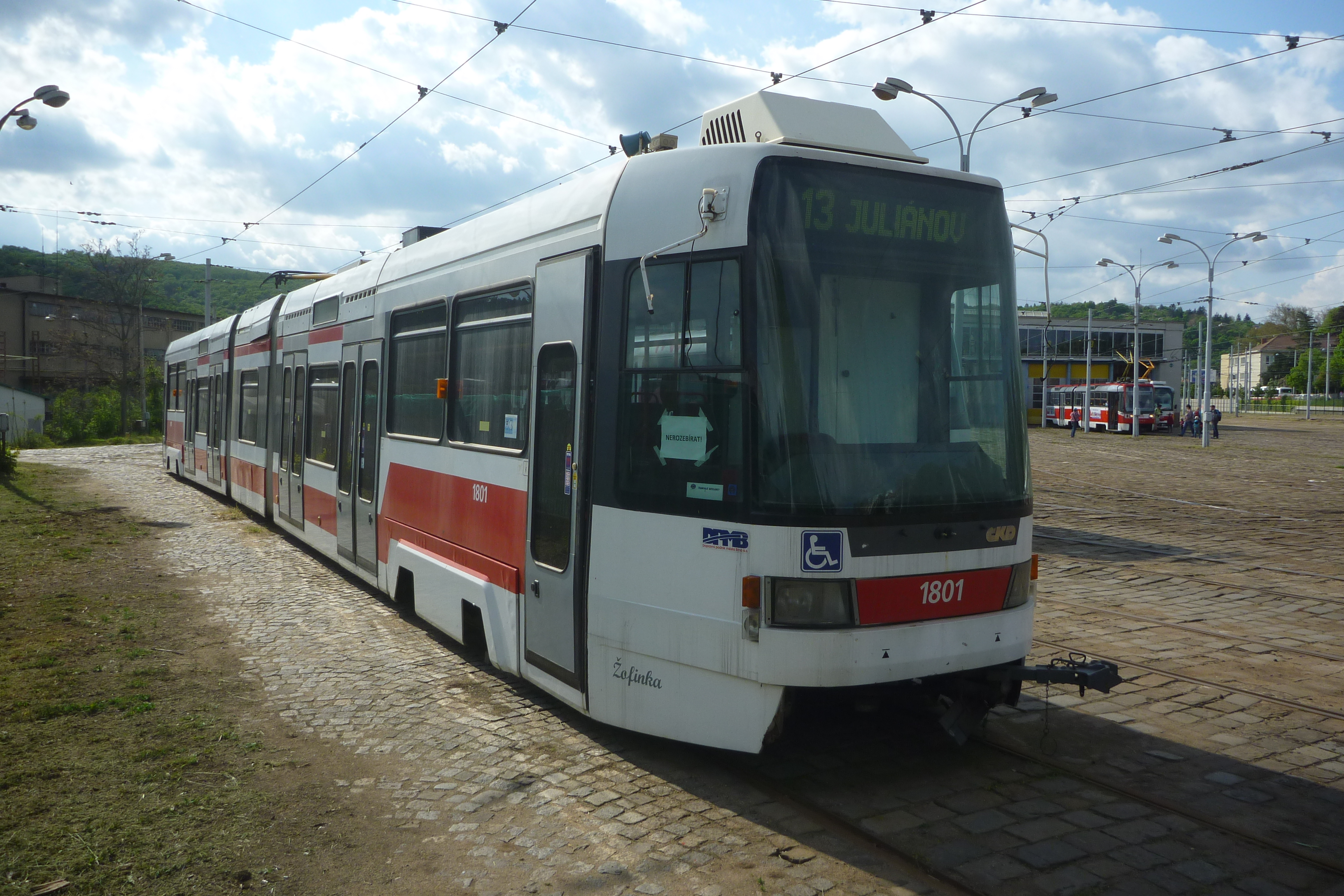 Odstavená částečně rozebraná tramvaj Tatra RT6N1 ev. č. 1801 ve vozovně Pisárky